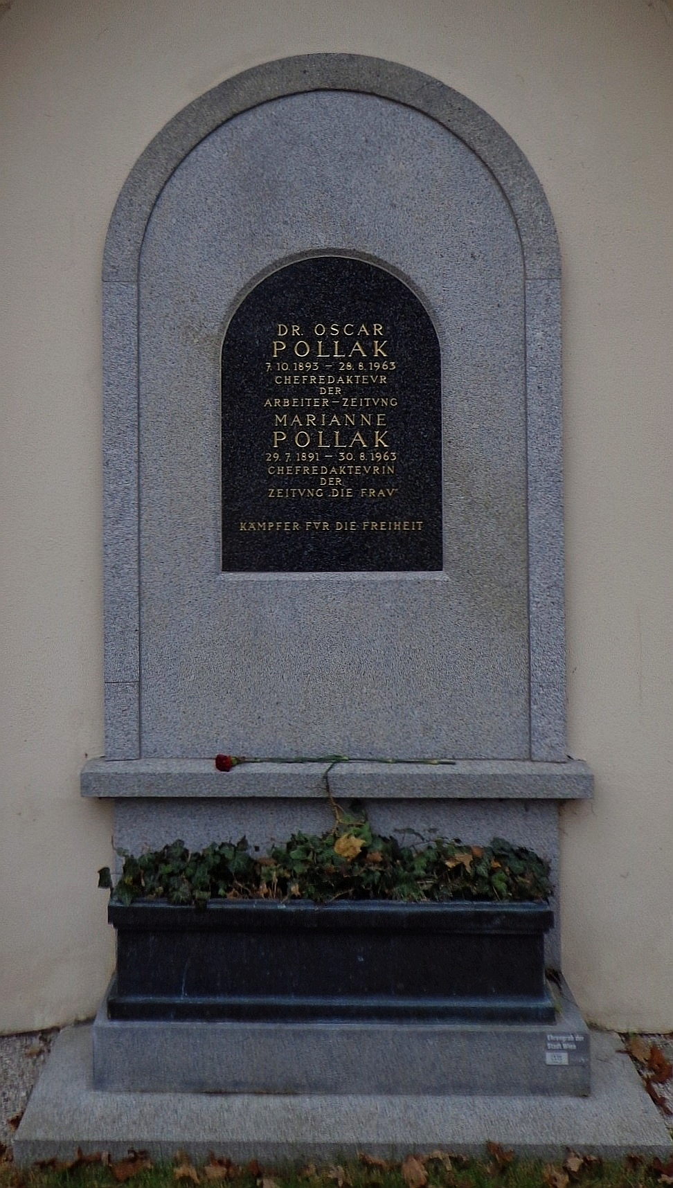 Feuerhalle Simmering - Abteilung ML (Umfassungsmauer): Urnengrab von Oscar und Marianne Pollak